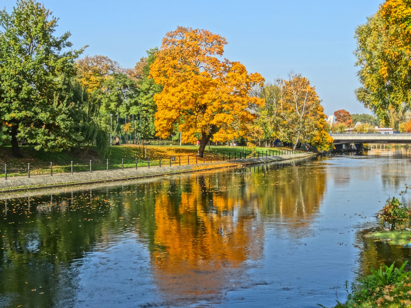 Odnoga Brdy Młynówka opływająca Wyspę Młyńską w Bydgoszczy